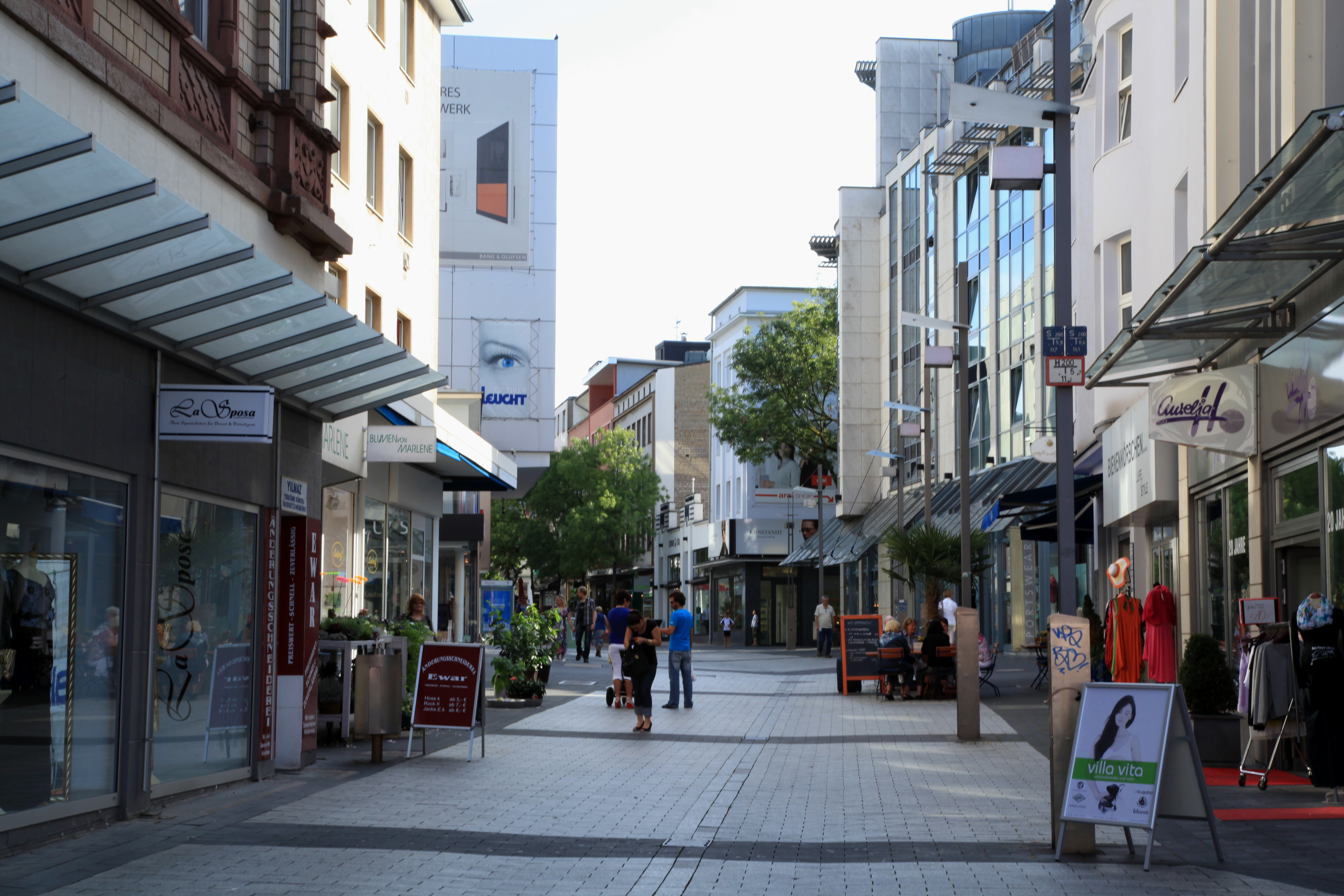 Hellweg in Bochum